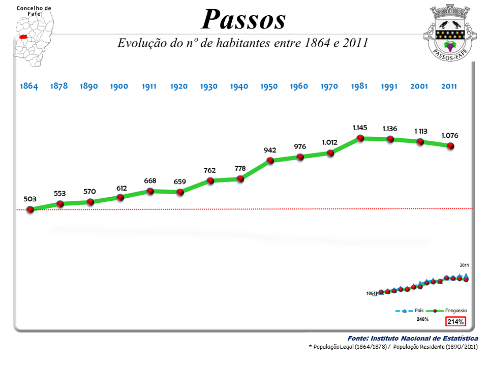 Censos 1864/2011